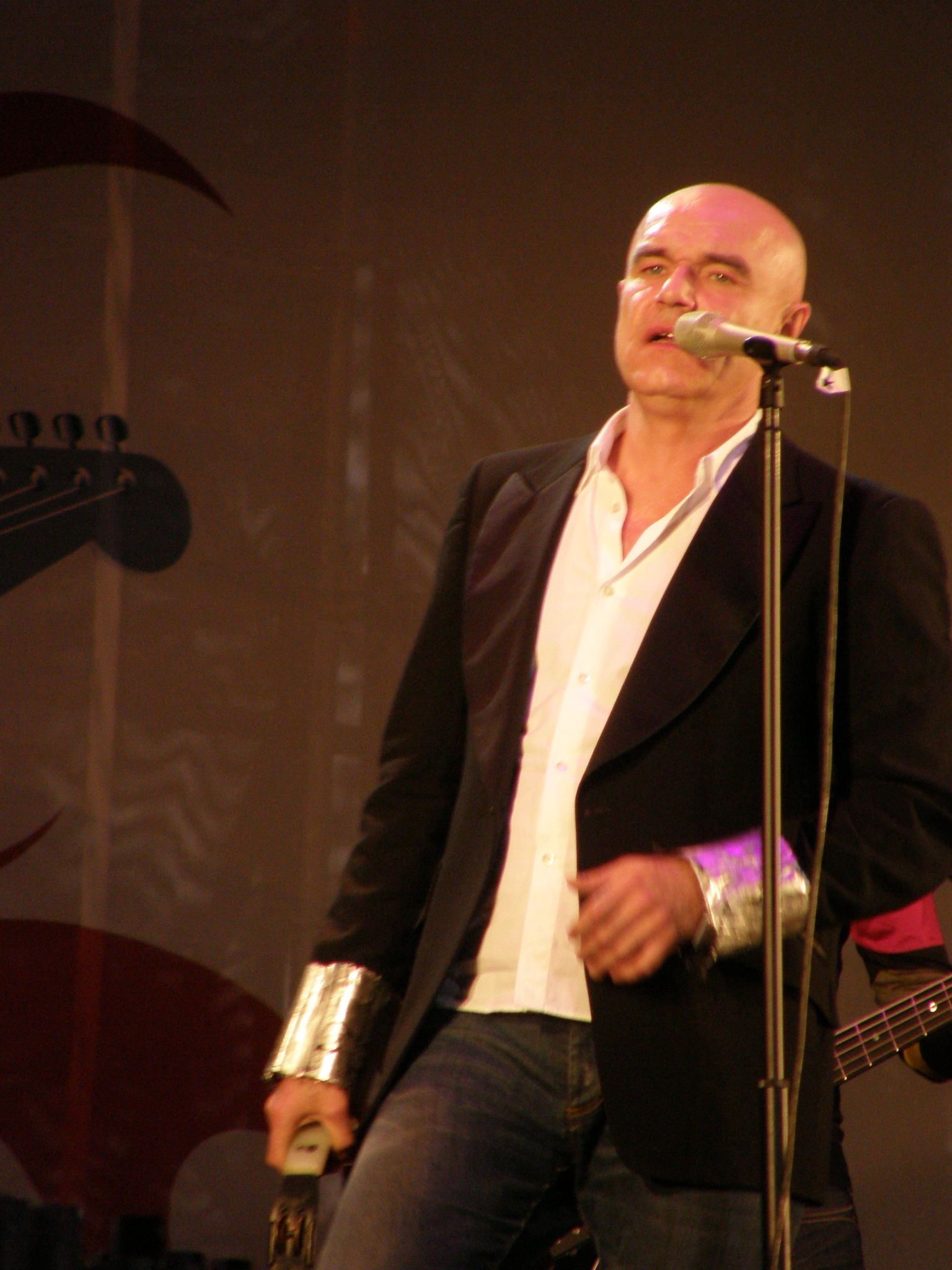 Концерт в парке Щербакова (Донецк) 6 июня 2010 года. Выступление группы «Моральный кодекс». Сергей Мазаев.